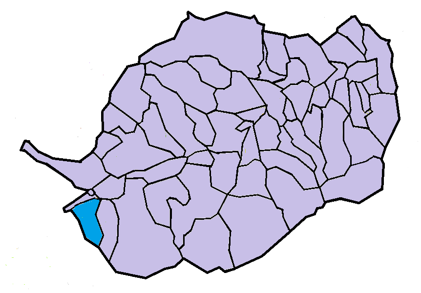 Sant Pere dels Forcats en el Conflent, a partir del mapa municipal del Conflent de lliure disposició adaptat al Nomenclàtor toponímic aprovat el 2007